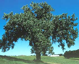 Plains Cottonwood (Populus deltoides).